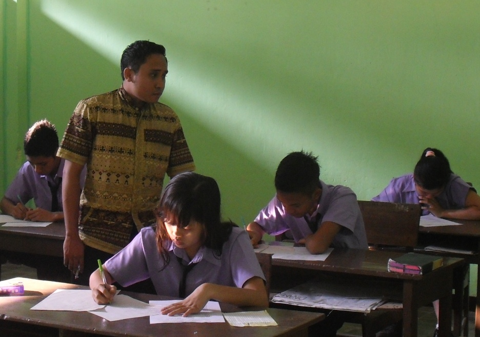 Pak Deflit Dujerslaim Lilo, M.Th mengawasi jalannya ulangan harian di kelas